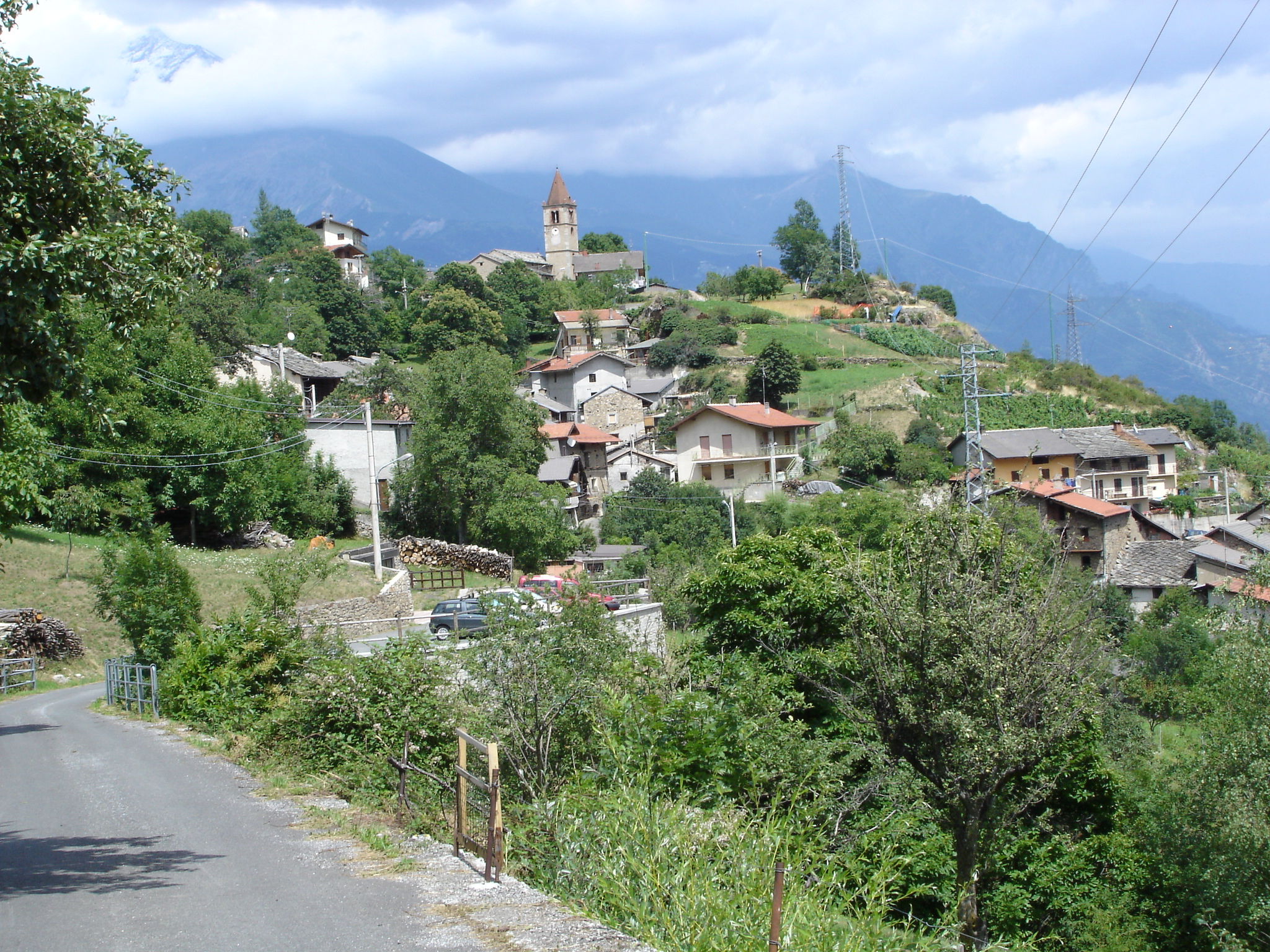 Ramat, frazione di Chiomonte (Valle di Susa)